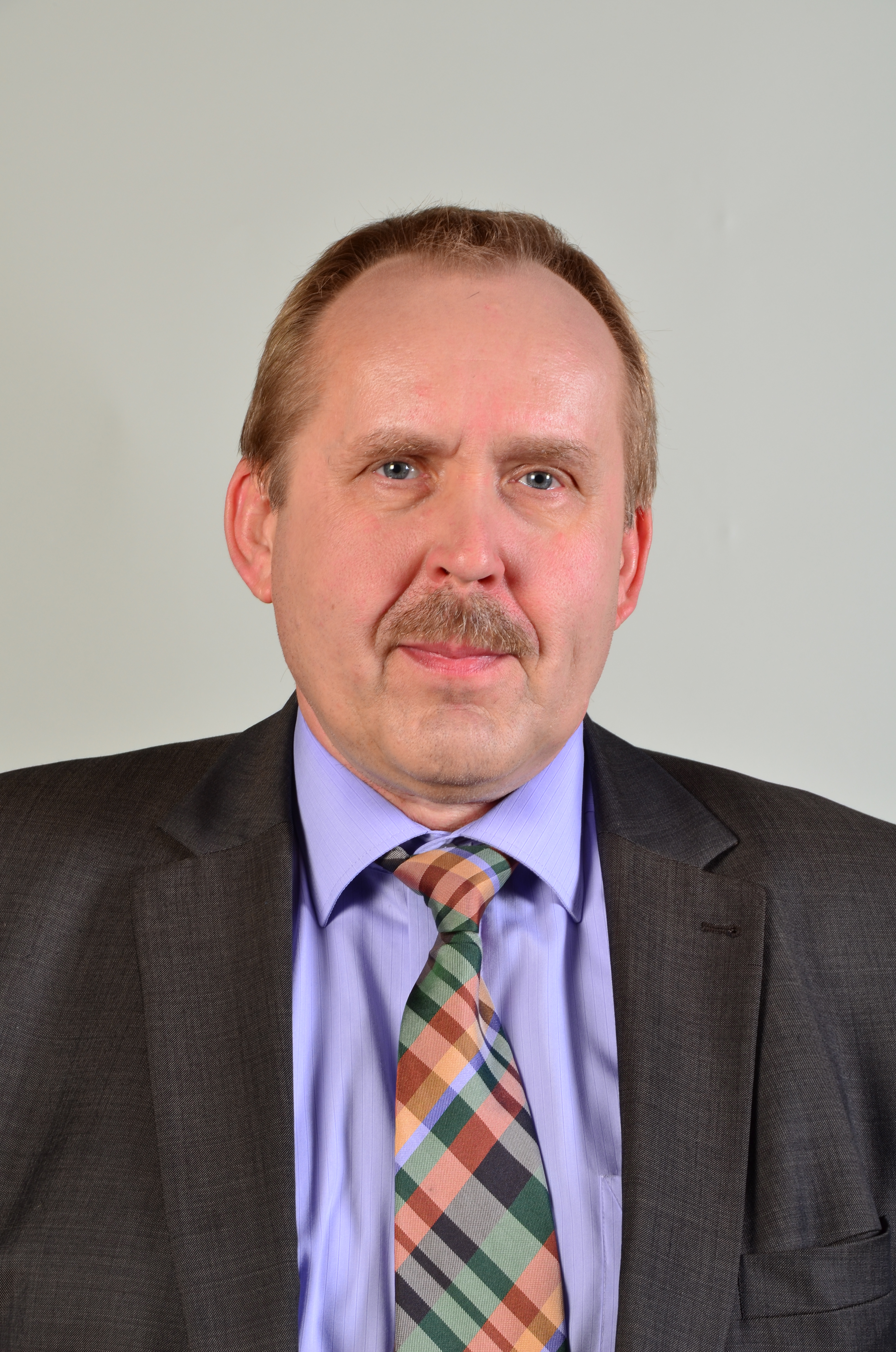 Michael Silkeit, Mitglied des Landtages Mecklenburg-Vorpommern